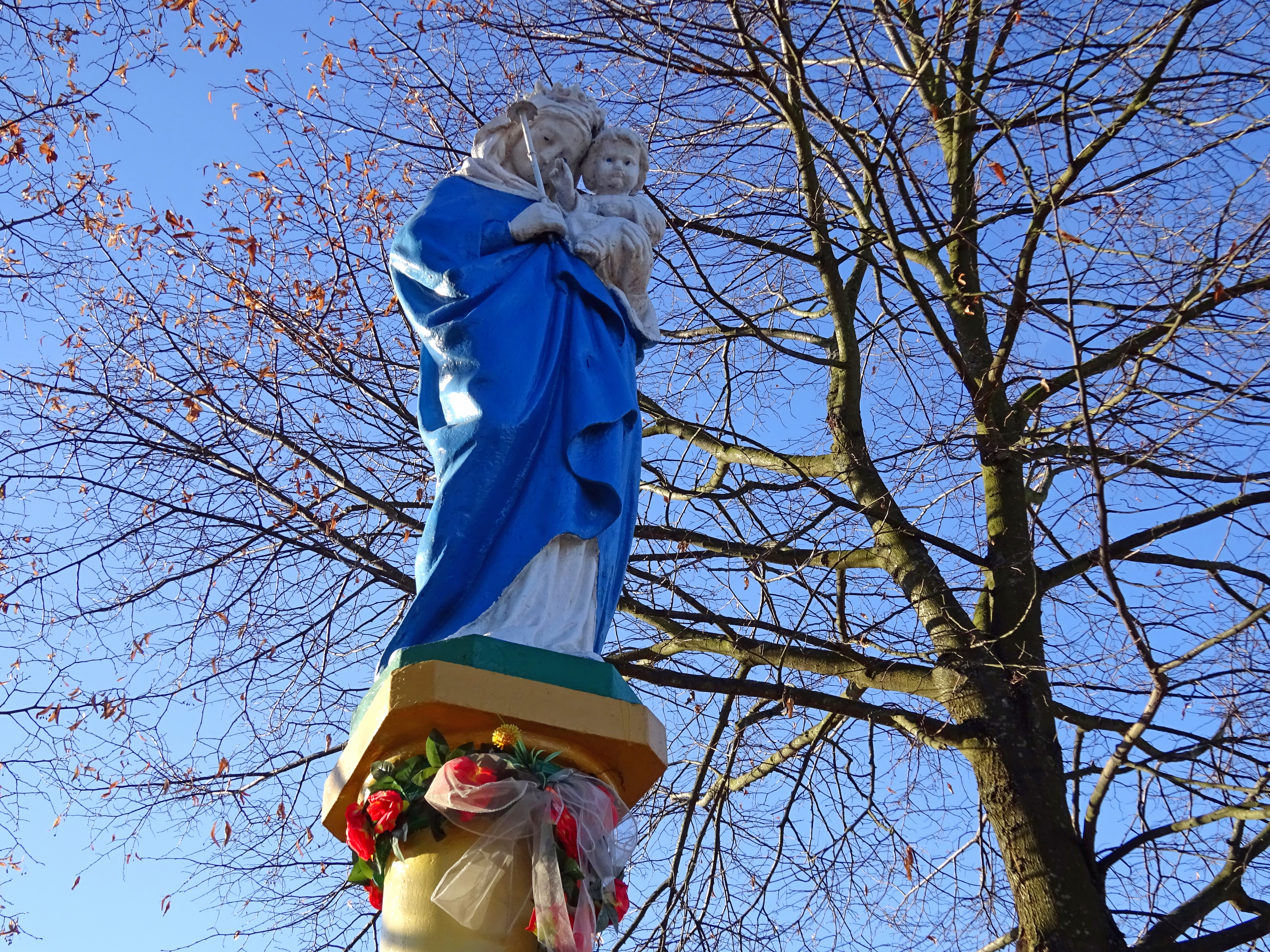 Dzierzbia - przydrożna kapliczka z 1899 r.